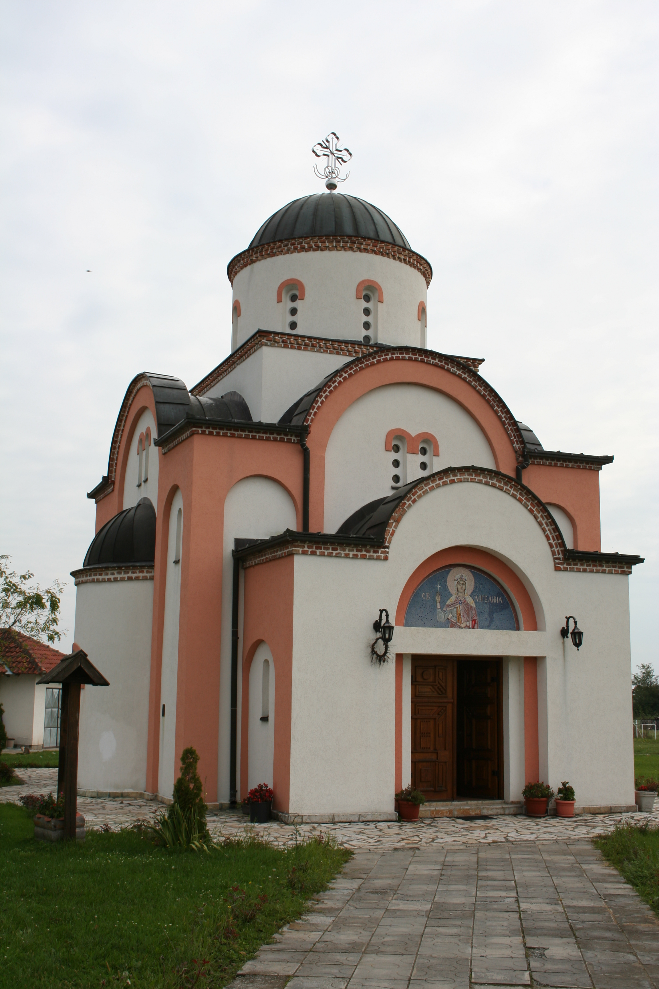 Crkva Sv. Angeline (Tulari)